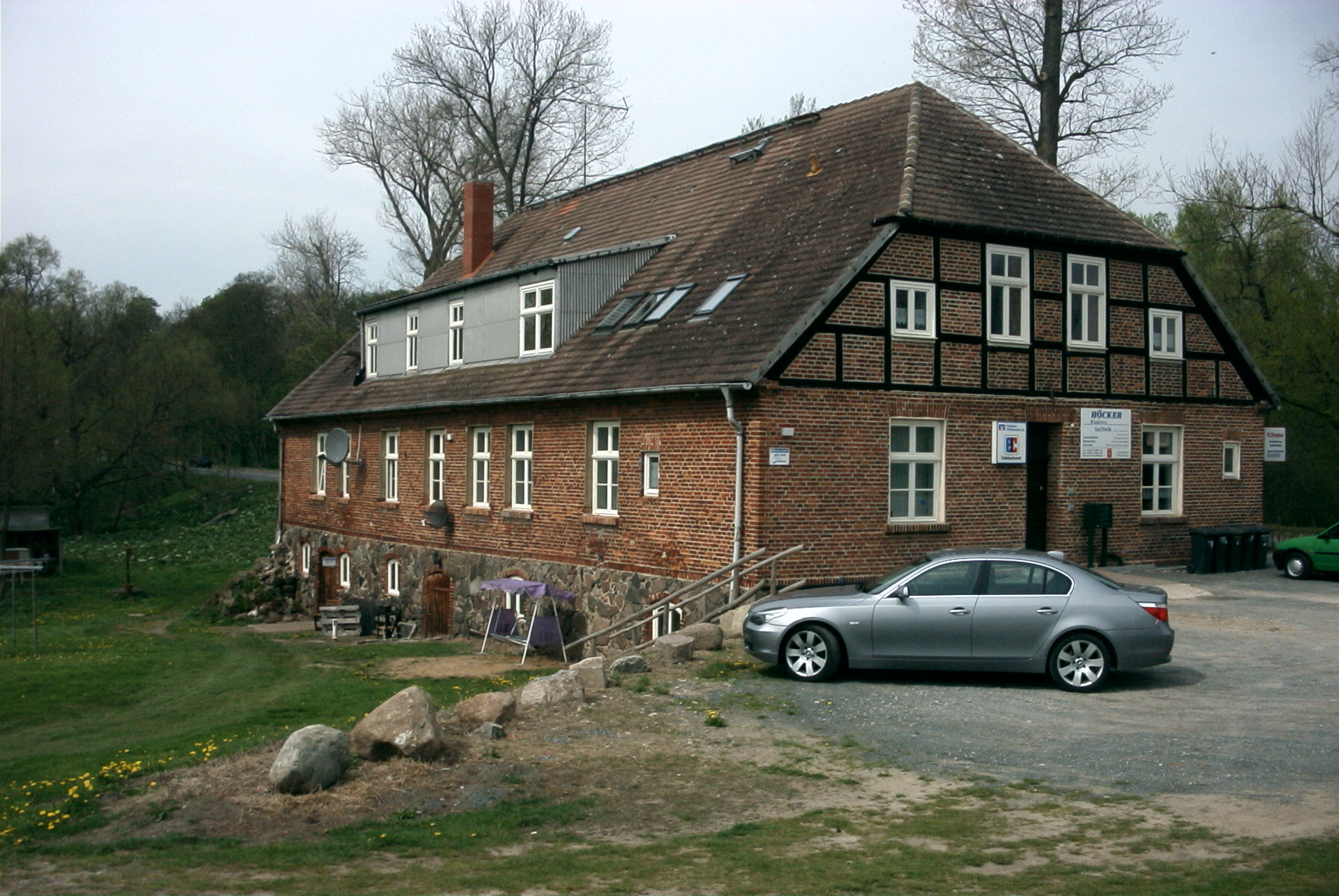 Wassermühle Ziethen, jetzt Wohnhaus